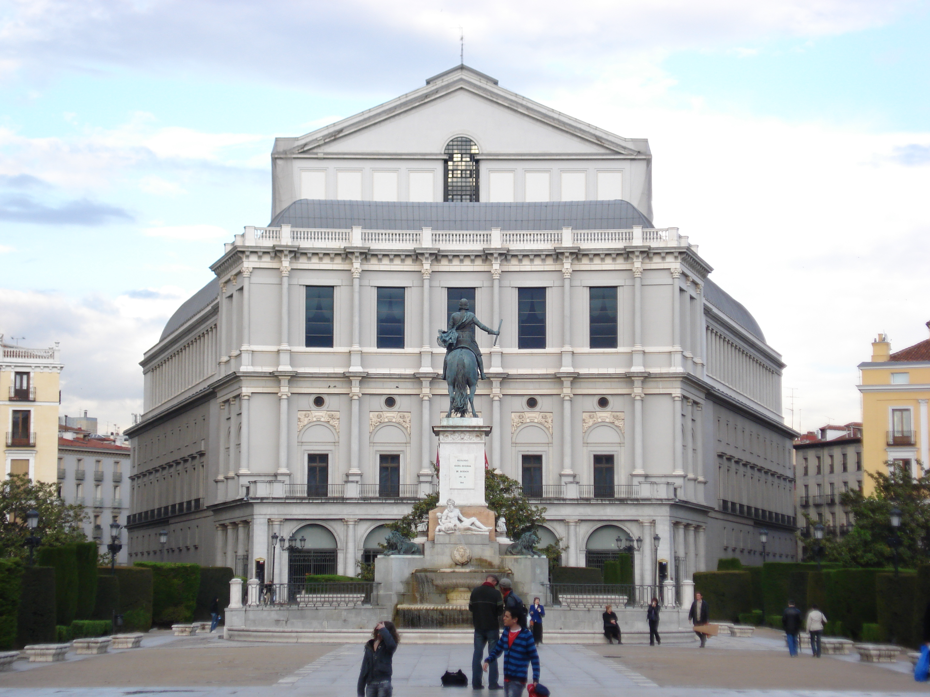 Façana principal del Teatro Real, vista des de la Plaça d'Orient.